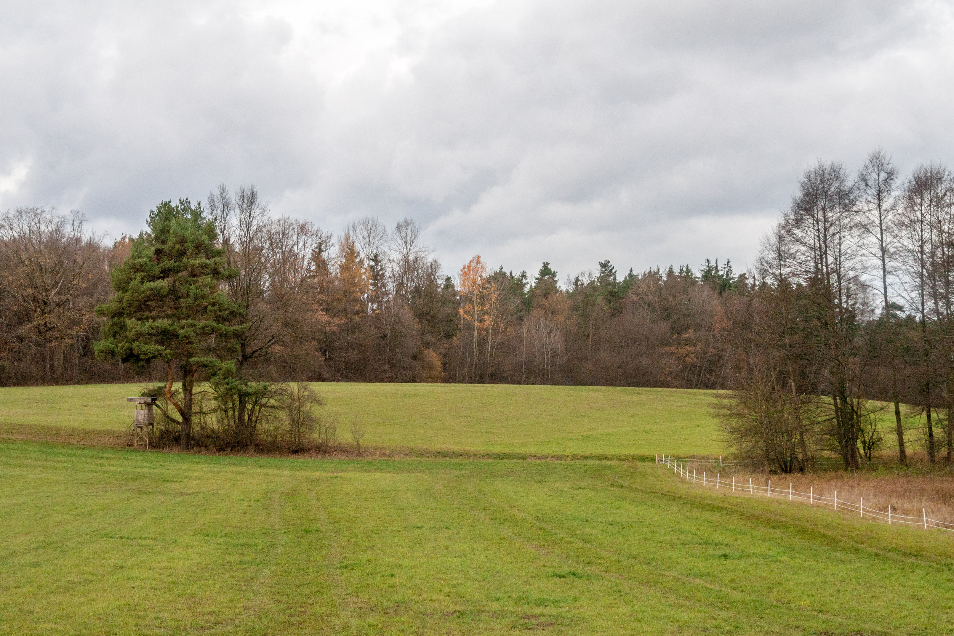 Landsschaftsschutzgebiet, Birnthon, Nürnberg